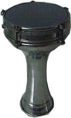 Darbuka from Wikipedia